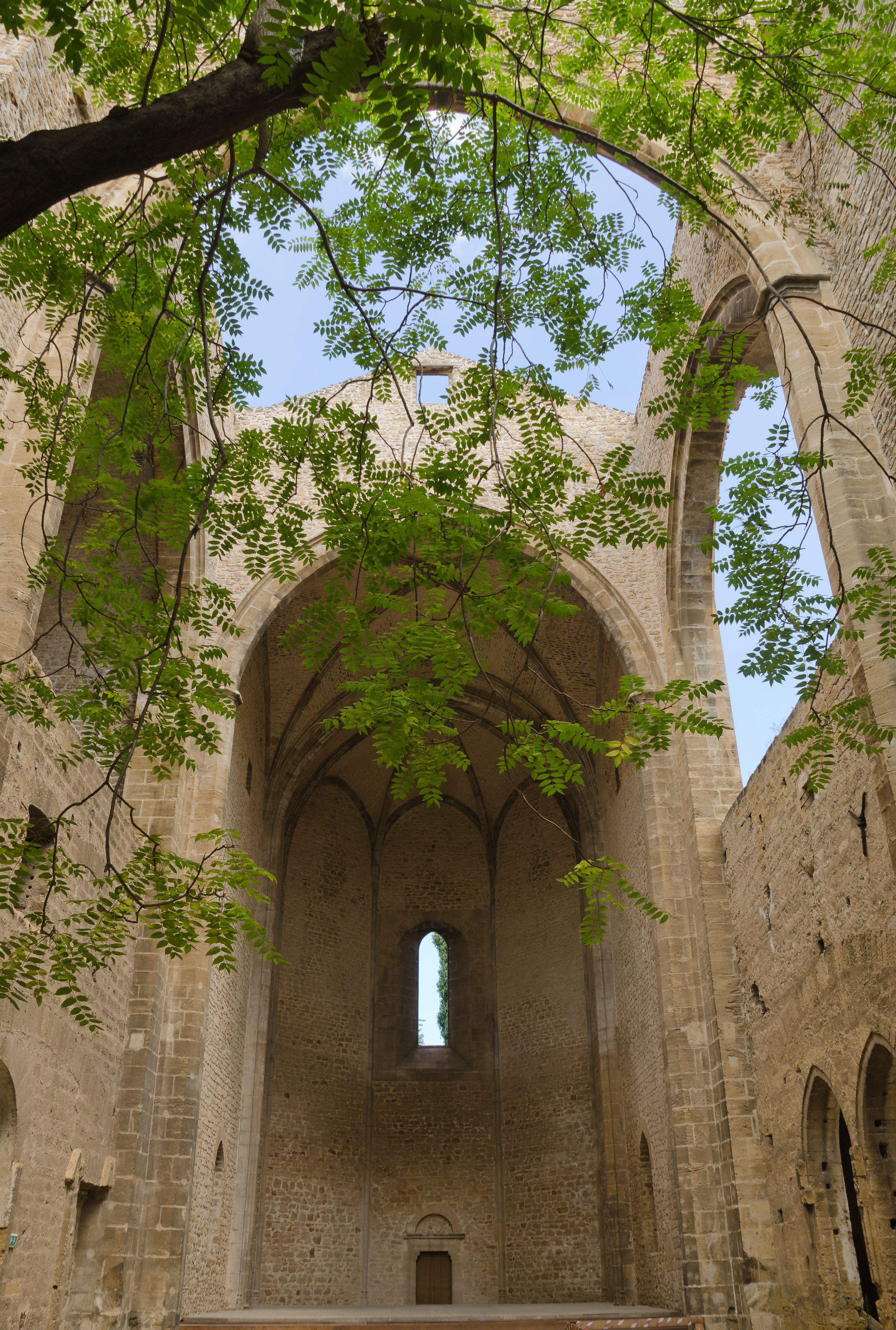 Santa Maria dello Spasimo, Palermo